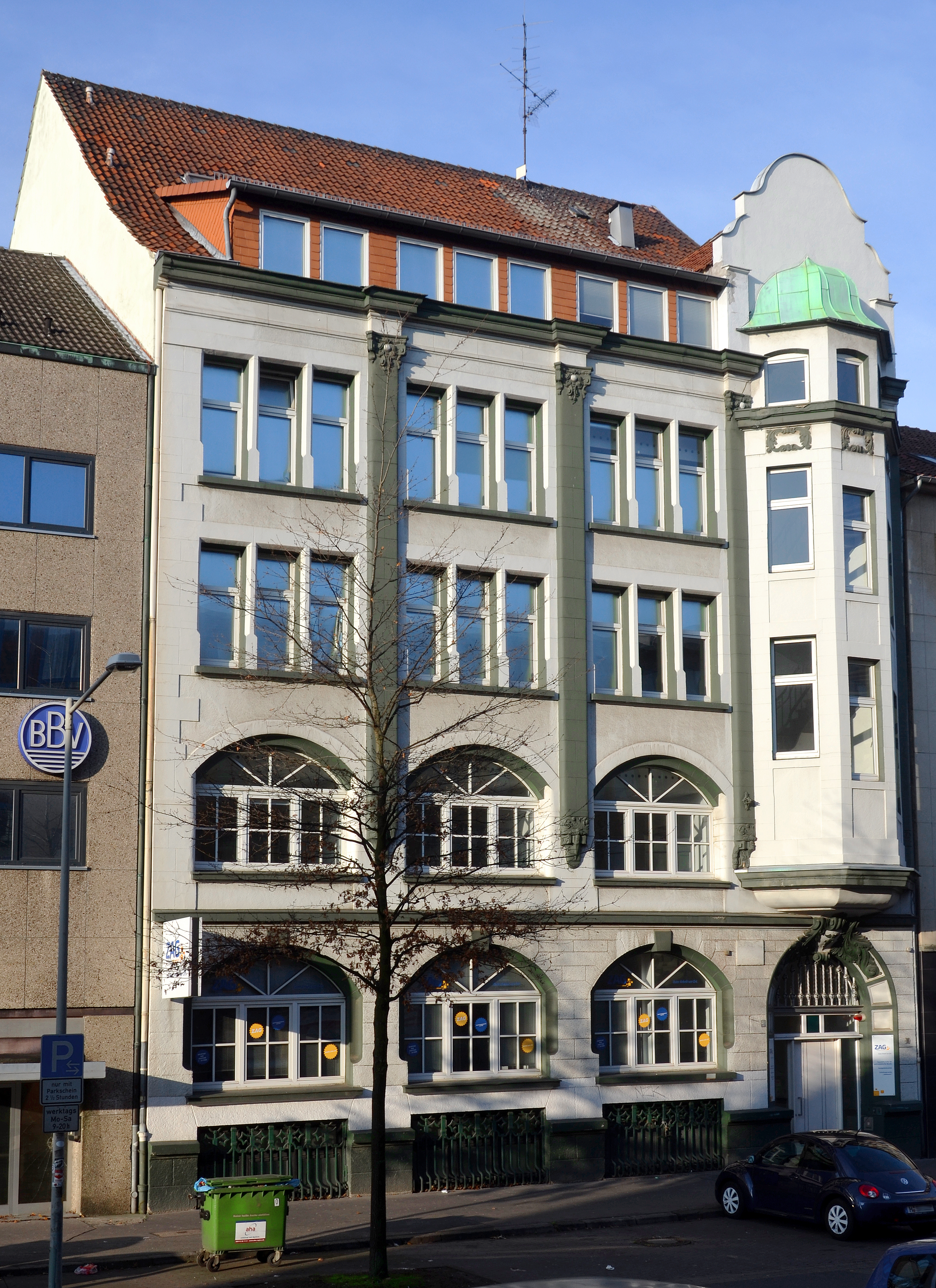 Das 1908 nach Plänen des Architekten Georg Thoféhrn durch Gustav Krebs errichtete Gebäude in der Nikolaistraße in Hannover war unter der Hausnummer 39 und 40 das Stammhaus des Papierherstellers und -großhändlers J. C. Kayser & Giesecke. In dieser Fotografie vom 21. Dezember 2016 ist es unter der Hausnummer 11 ein Nebengebäude der Zeitarbeitsfirma ZAG ...